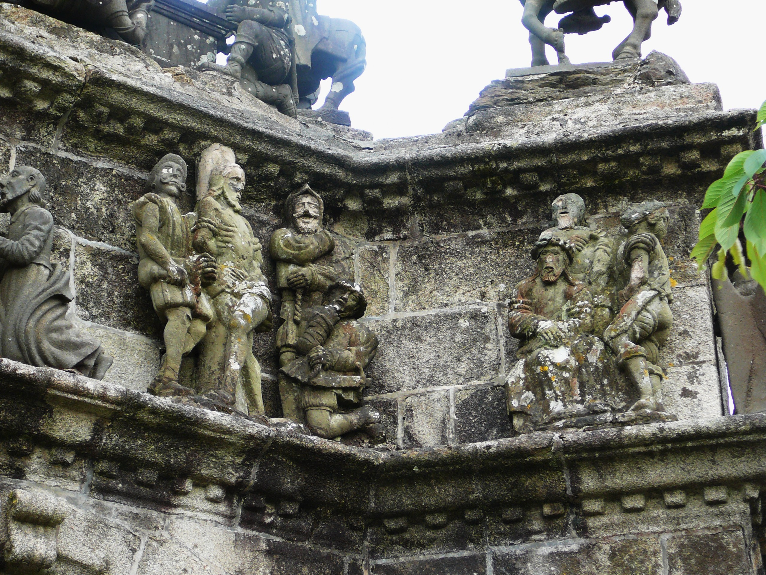 Pleyben : le calvaire, détail vue 2